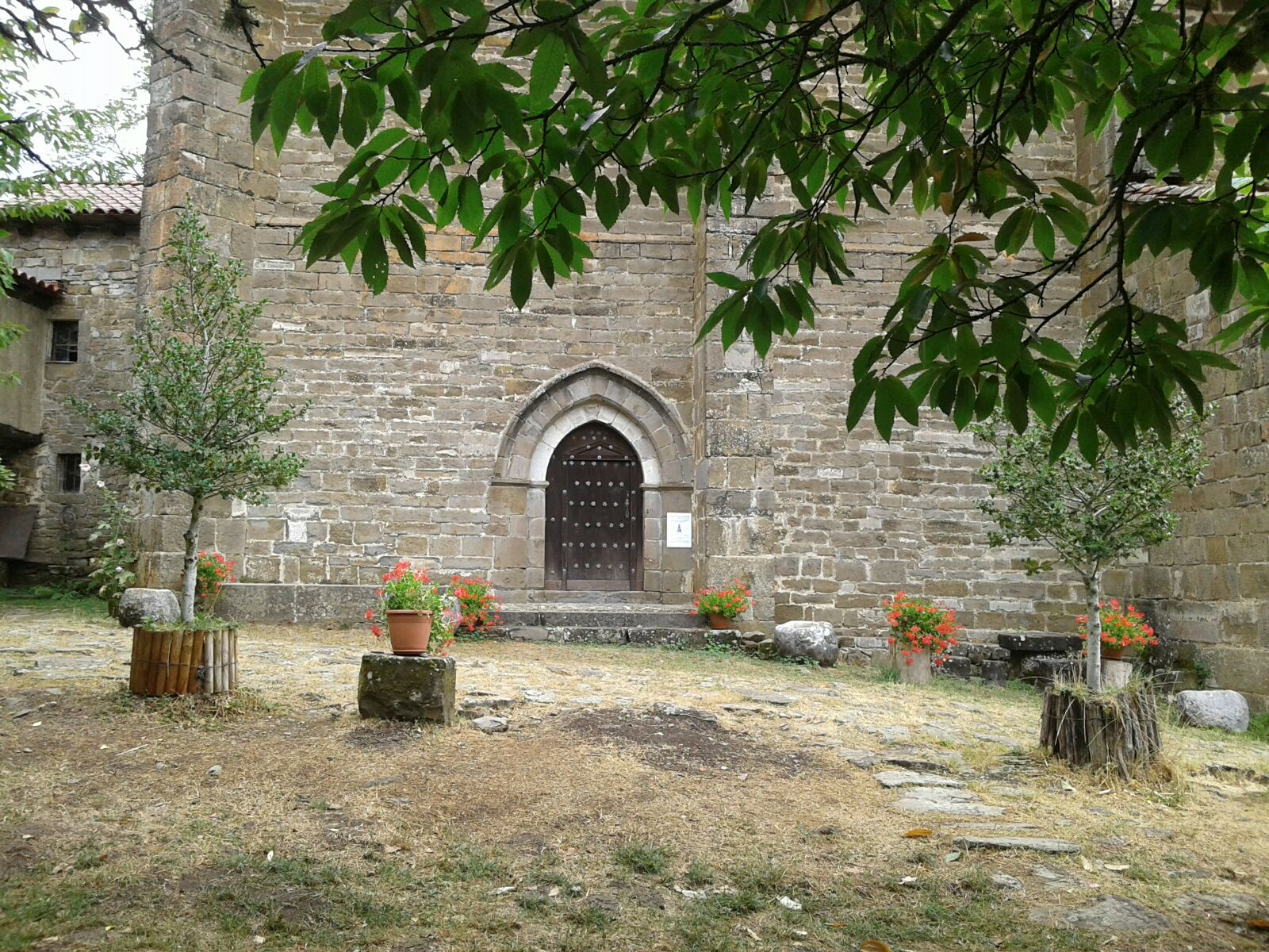 idoia, Ermita de la virgen de Idoya, Isaba, Navarra